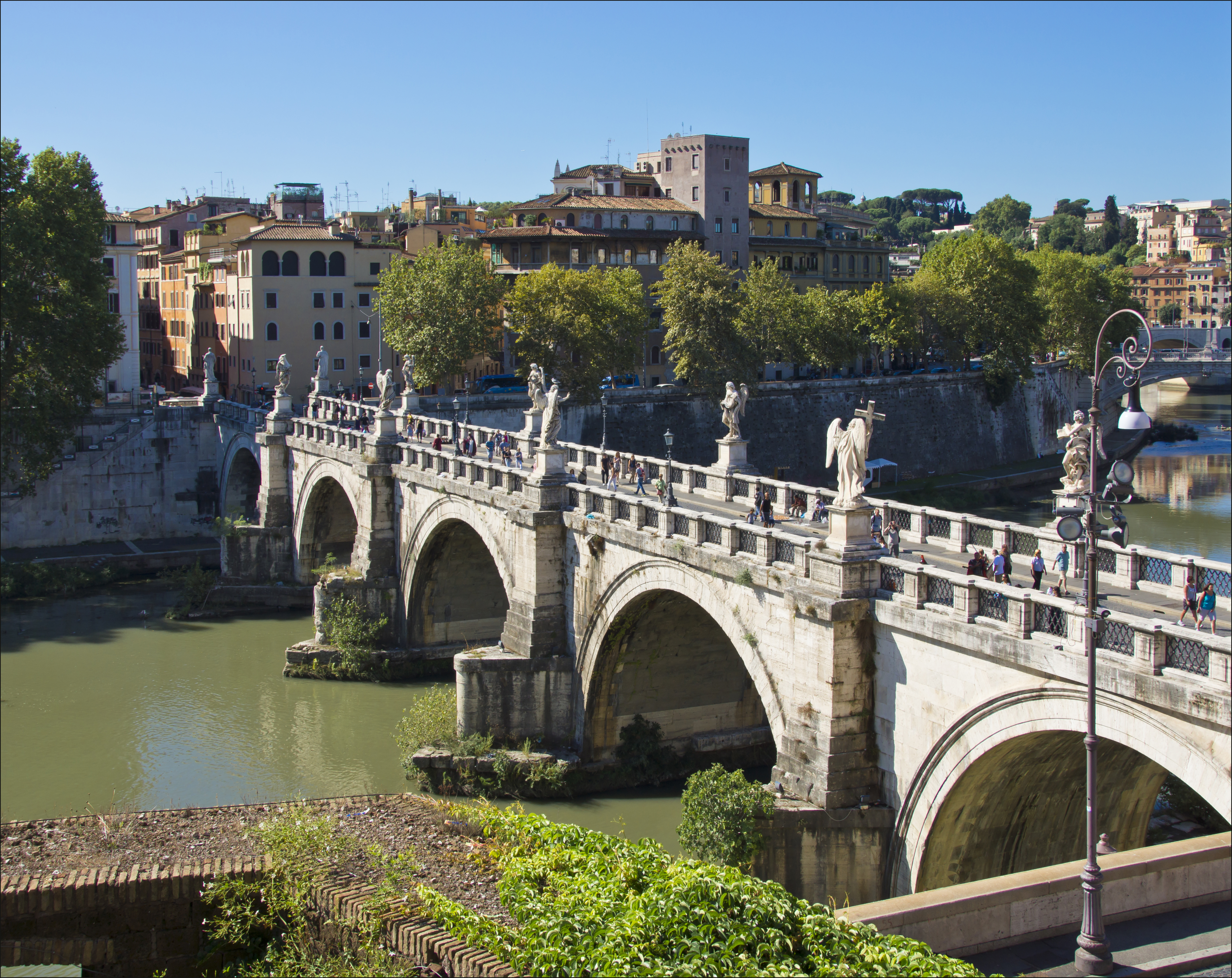 Ponte Sant'Angelo - Roma / Rome - Lazio - Italia / Italy